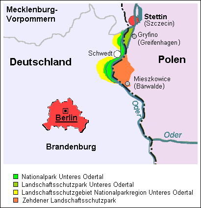 Beschreibung: Karte des Intentationalparks Unteres Odertal Quelle: Sascha Maier Deltonfo 15:24, 29. Jul 2006 (CEST) Zeichner: Sascha Maier Deltonfo 15:24, 29. Jul 2006 (CEST) Lizenzstatus: GFDL und Creative Commons CC-BY 2.5